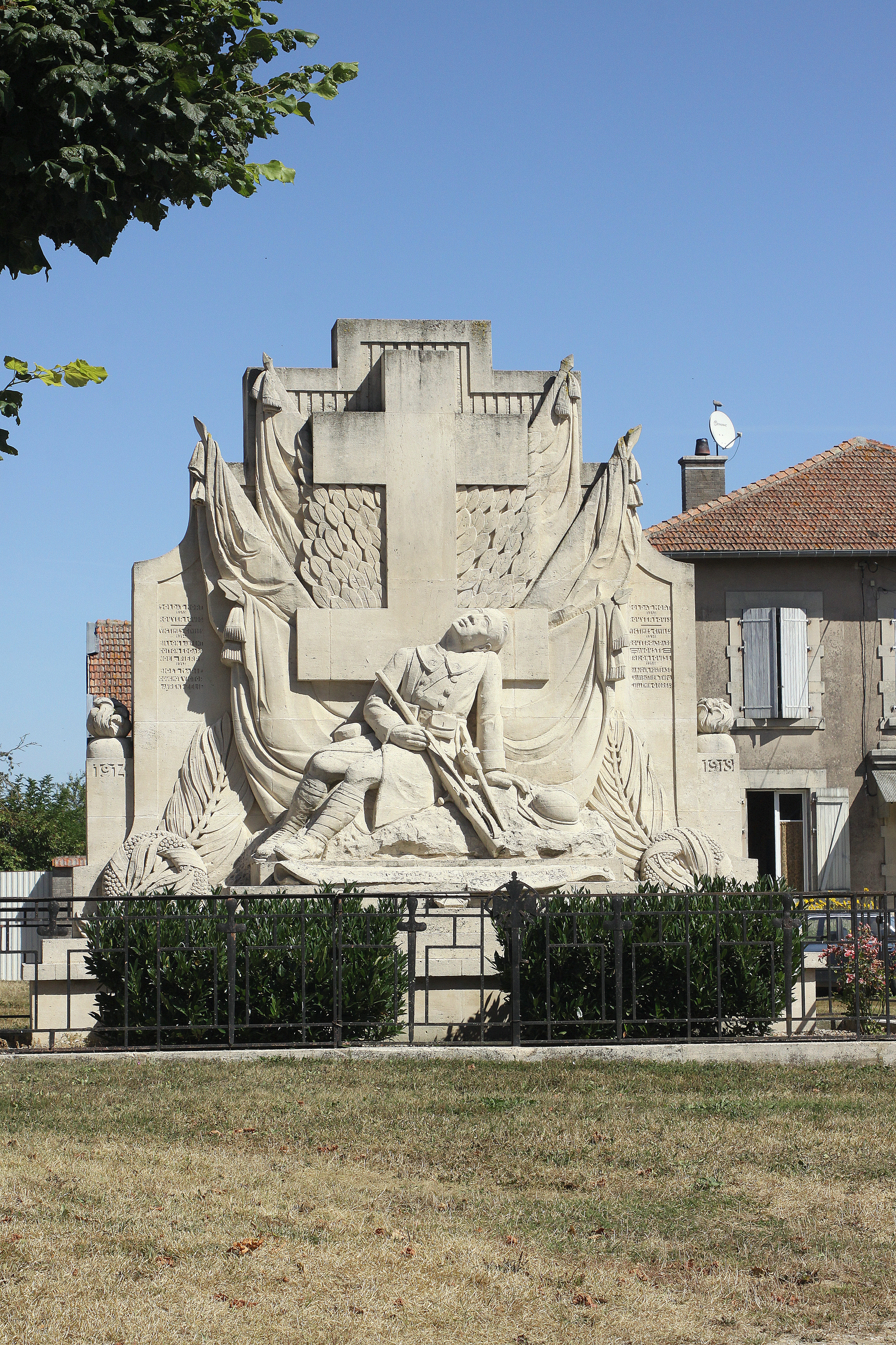 Monument aux morts 1914-1918 à Richecourt